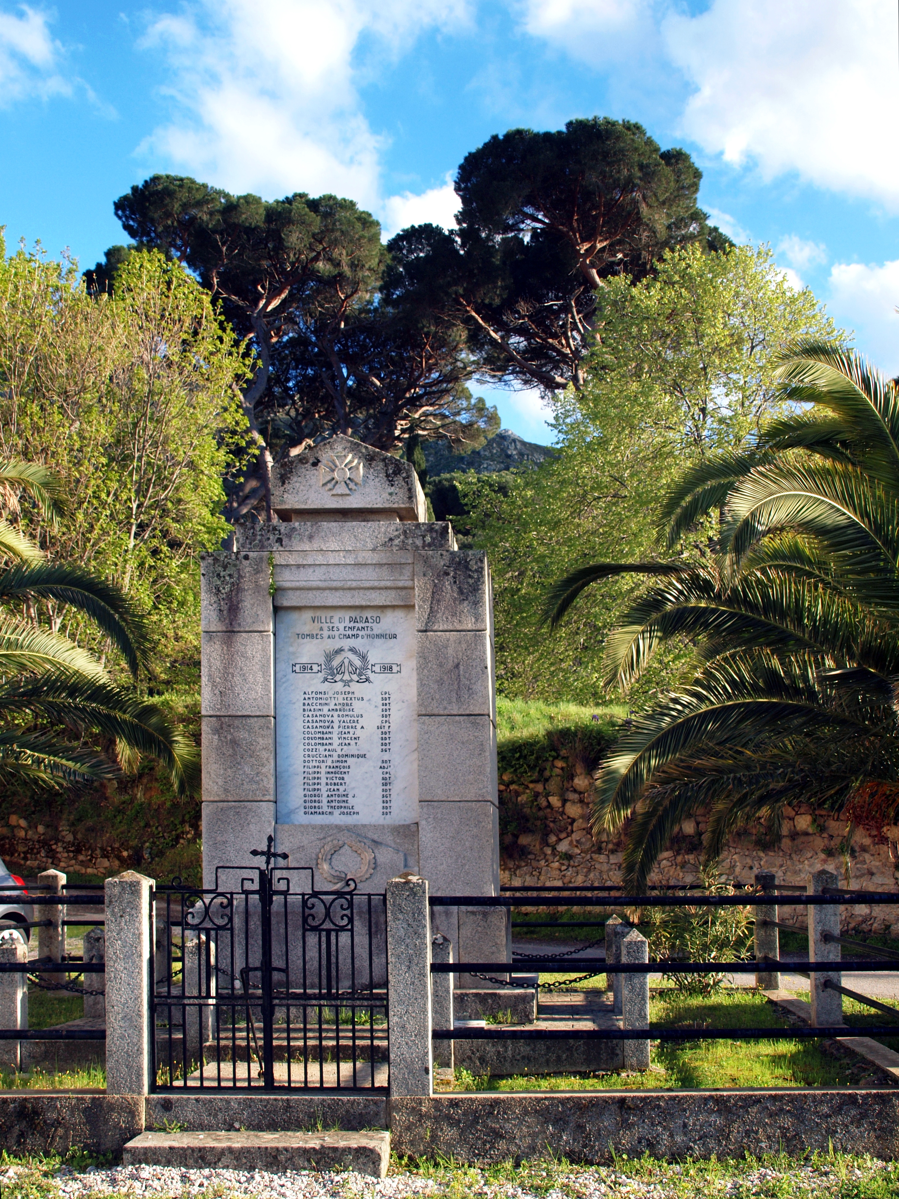 Ville-di-Paraso, Balagne (Haute-Corse) - Monument aux morts